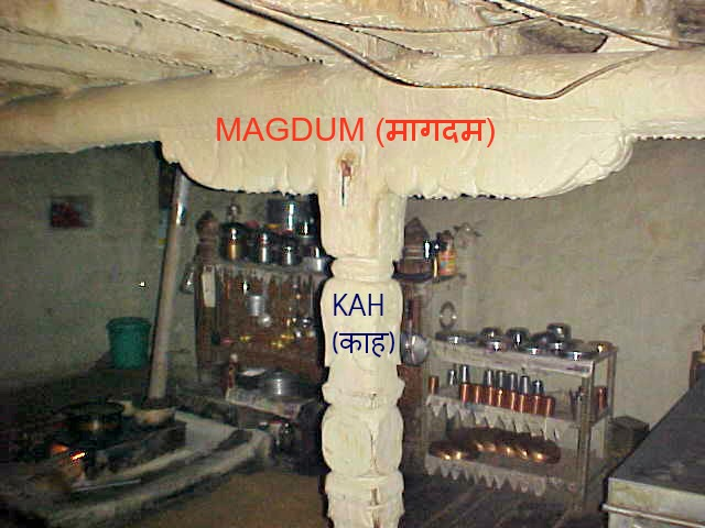 मागदम और काह